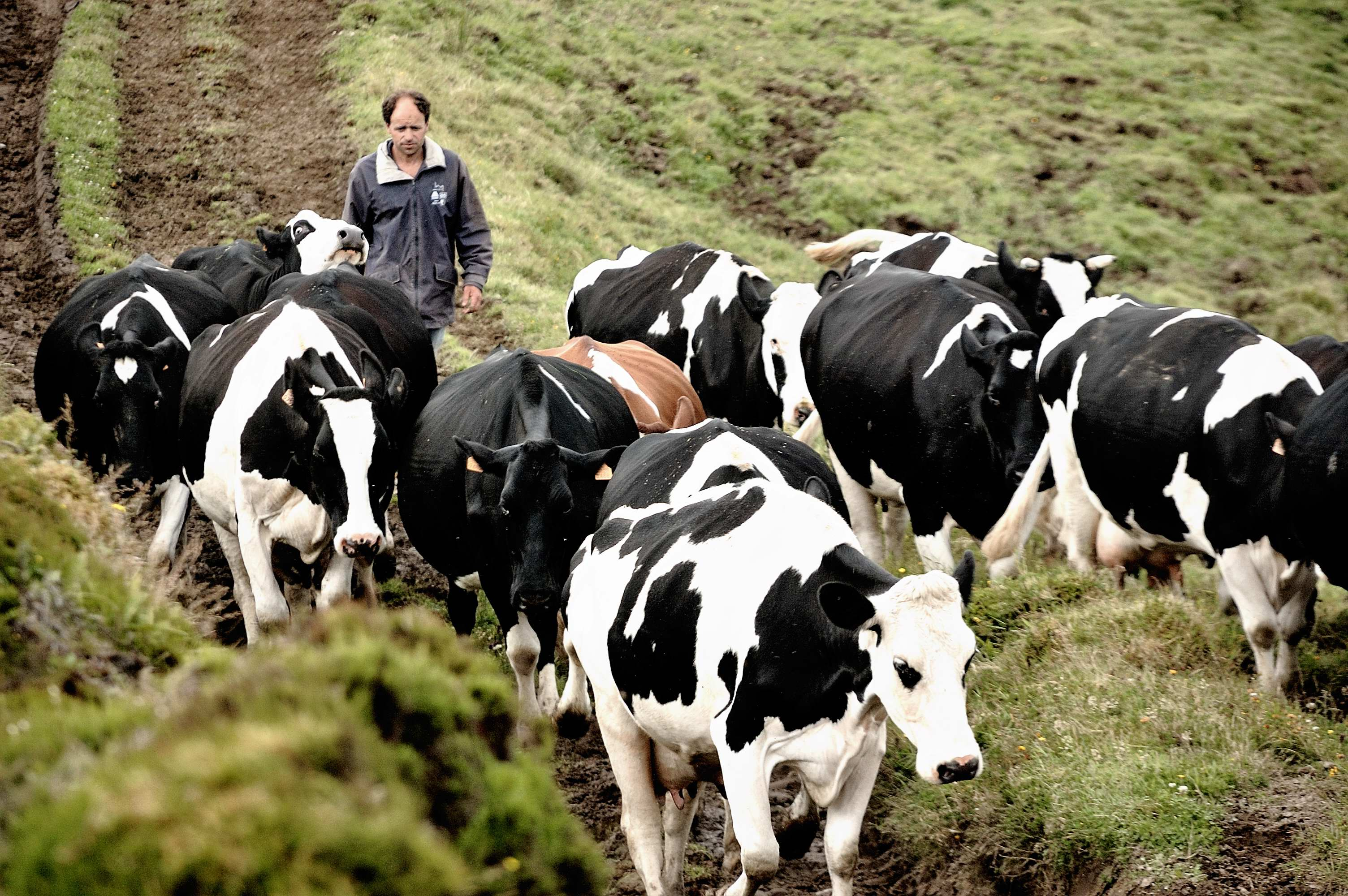 Azores